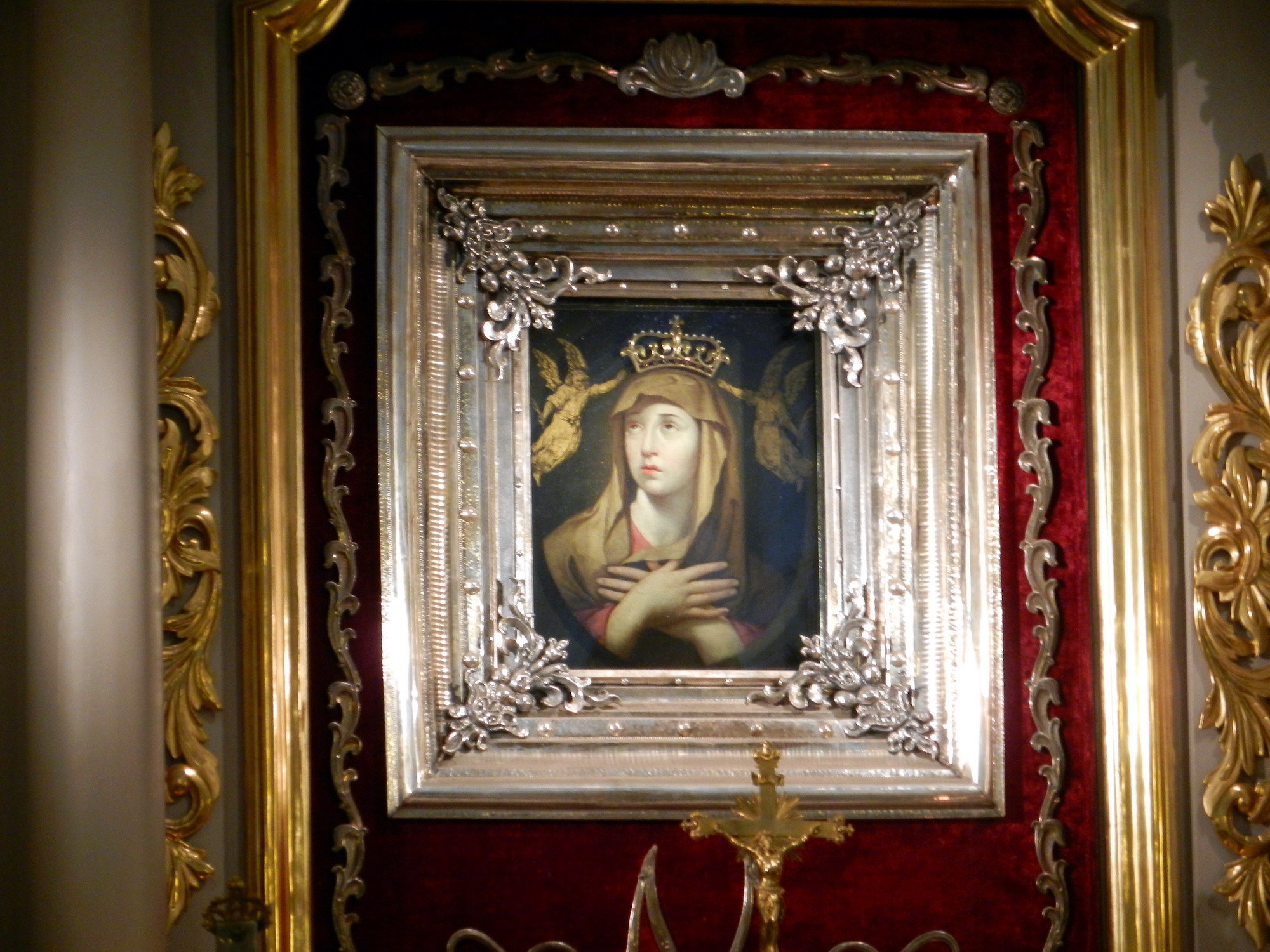 Kościół św. Elżbiety w Powsinie - cudowny obraz Matki Bożej Tęskniącej.